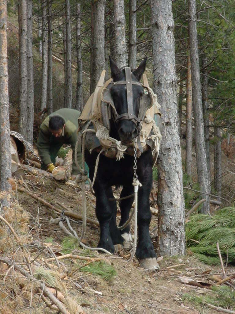 cavall retirant fusta en terrenys de difícil accés